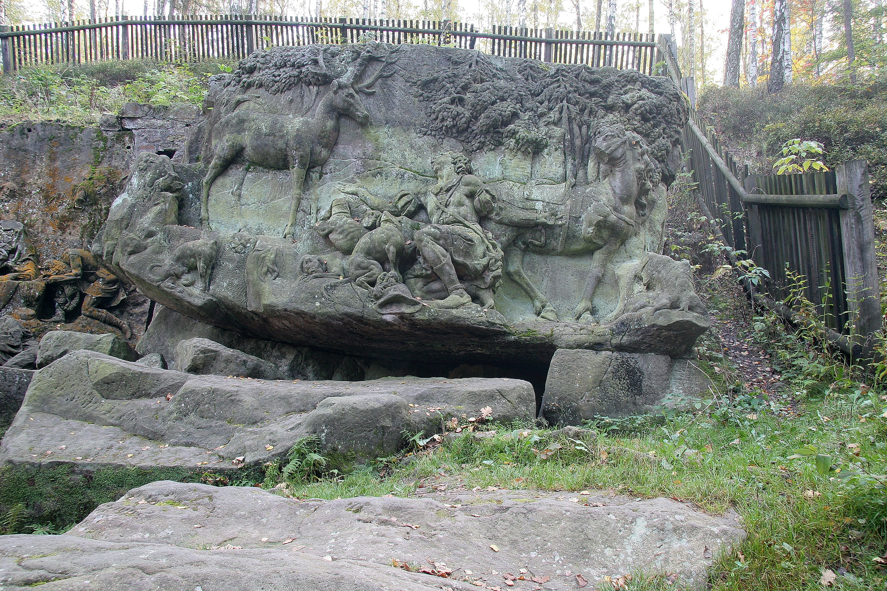 Sochy - Betlém v Novém lese u Kuksu, soubor sochařských děl (Stanovice), Betlém, Stanovice